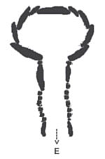 Anta da Aboboreira (planta)- dolmen - Baião Portugal